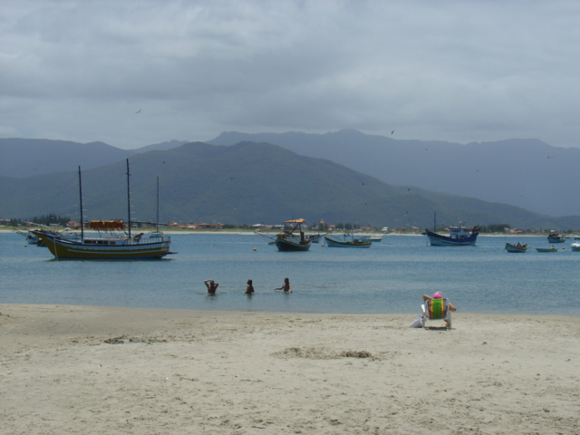 Beach at Praia de Baixo, Garopaba, Brazil